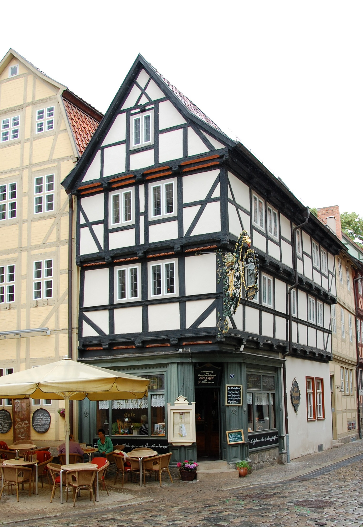 Haus Breite Straße 1 in Quedlinburg (ursprünglich Nr. 4)